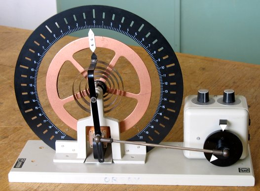 Photographie d'un pendule de Pohl (distributeur Leybold) (Photographie personnelle) Catégorie:Image_de_Physique